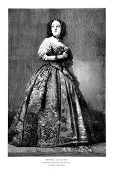 Teodora Lamadrid, actriz española